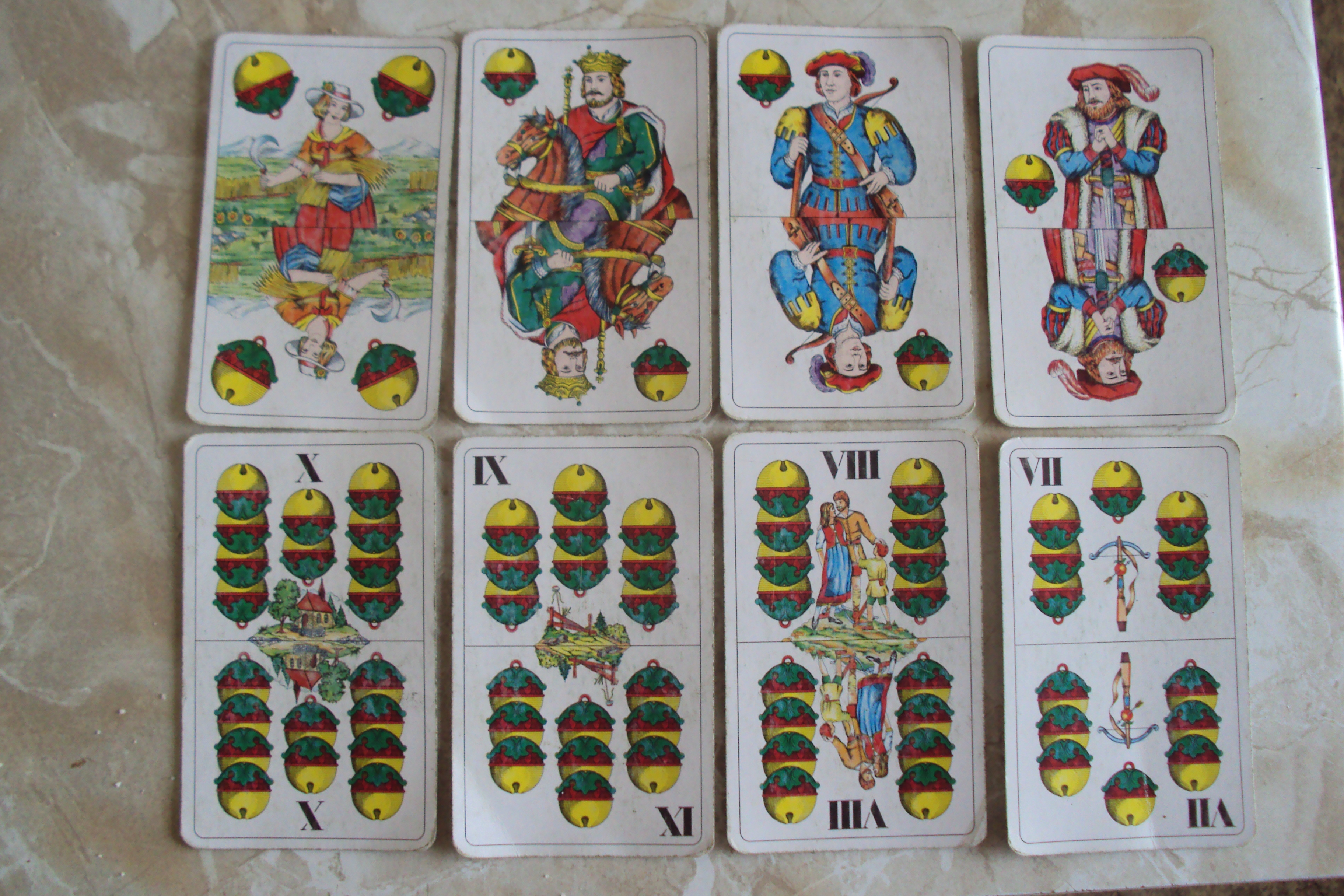 Kule v německýsh kartách